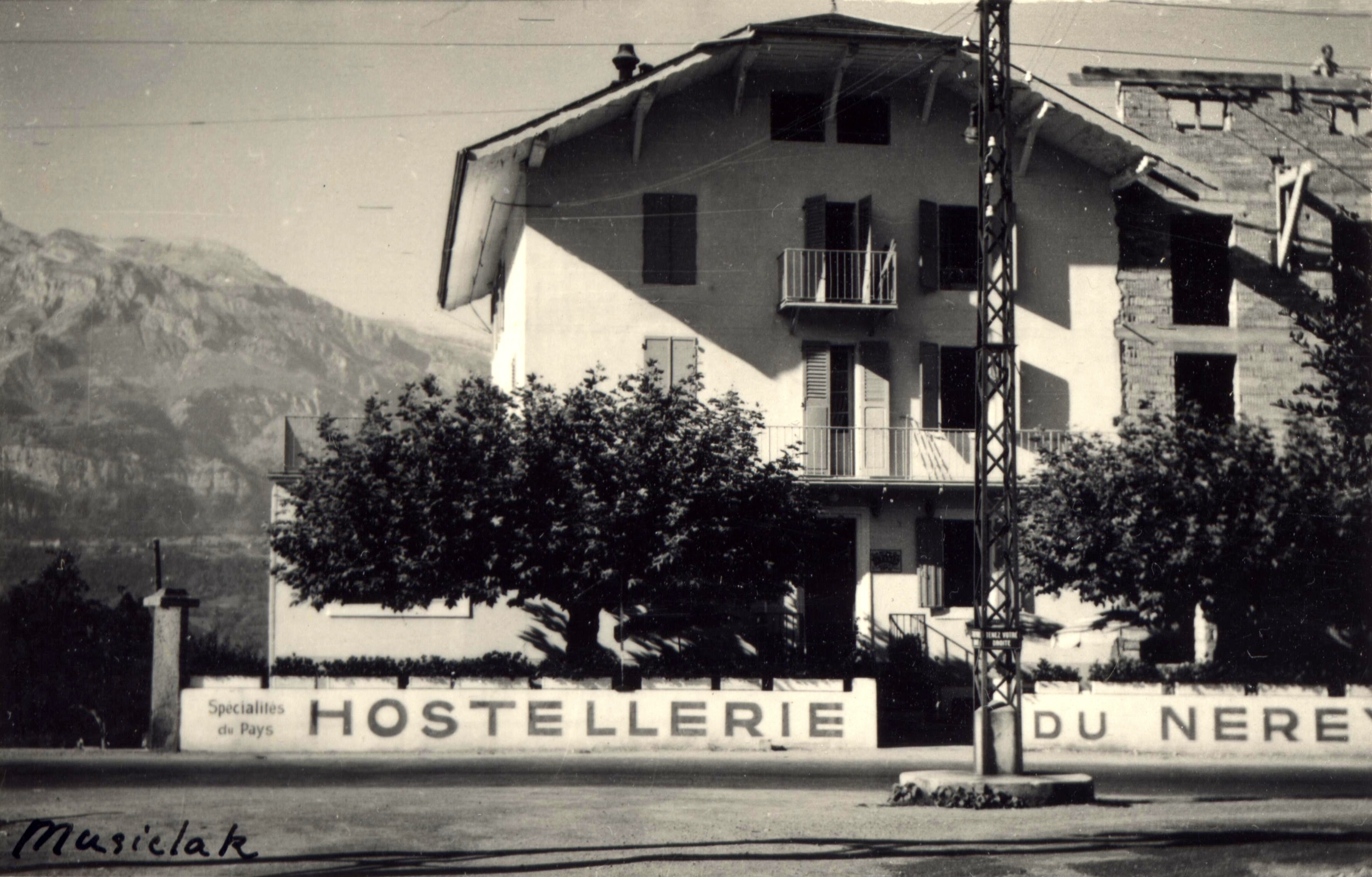 Hostellerie du Nérey.